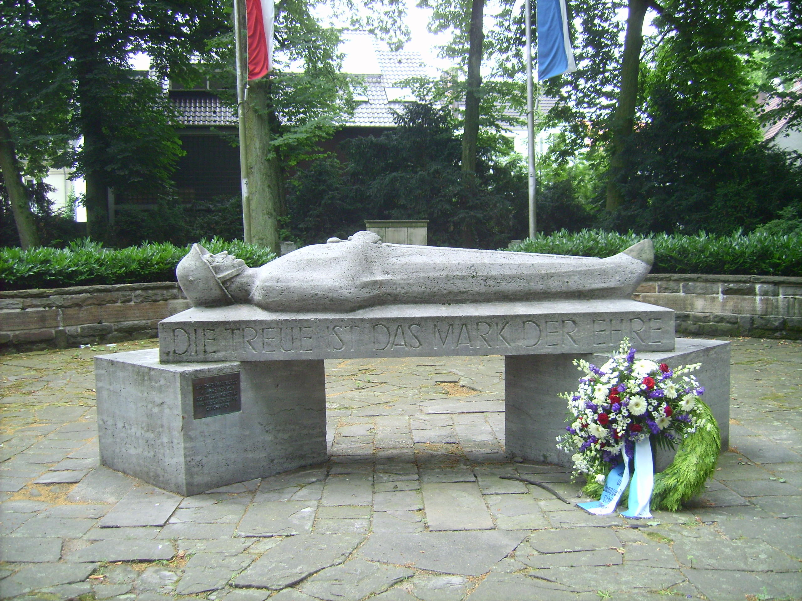 Ein in Coesfeld befindliches Ehrenmal, erschaffen im Jahre 1928 von Professor Enseling